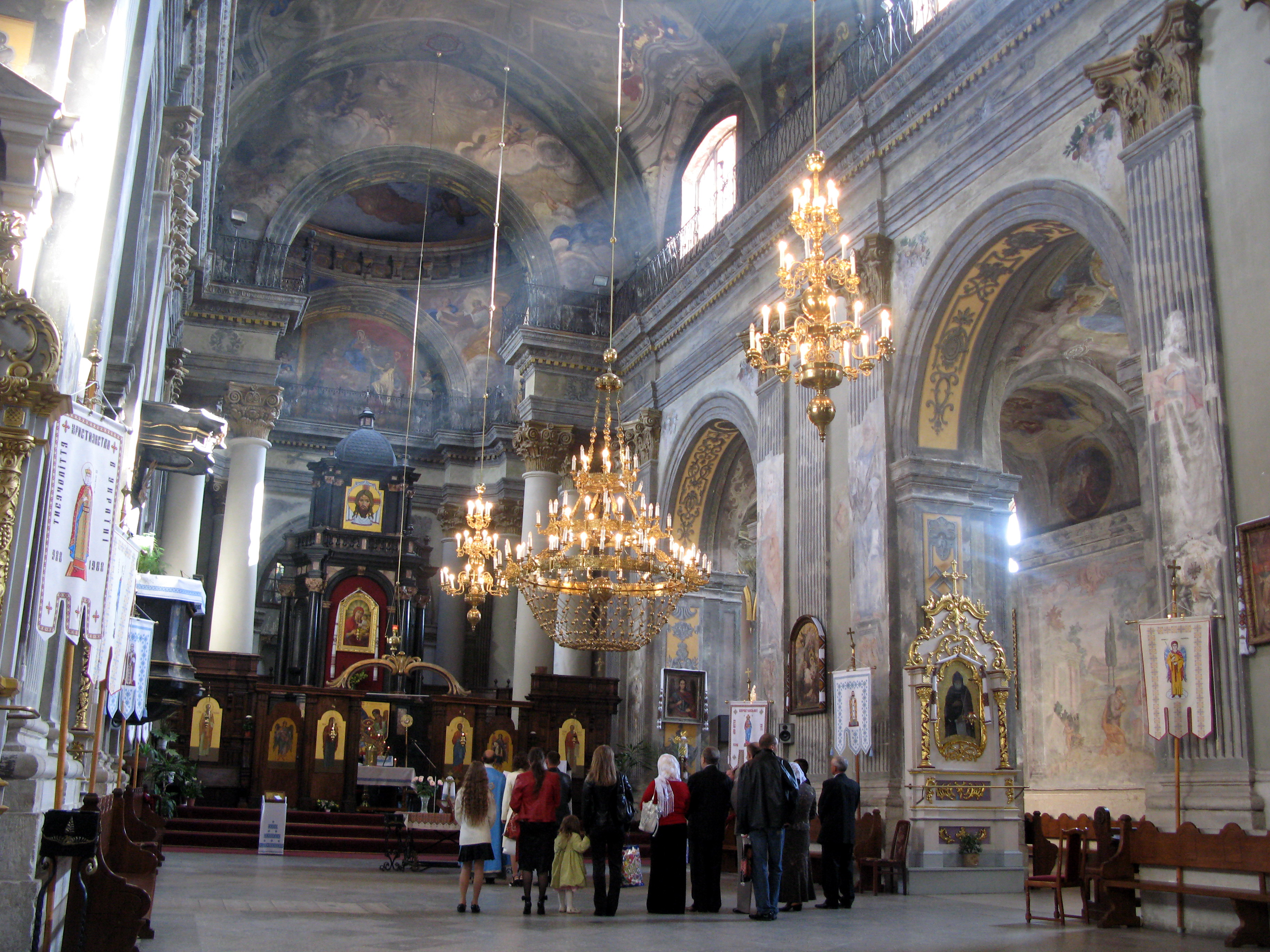 Церква св. Михайла, Львів, Винниченка вул., 22